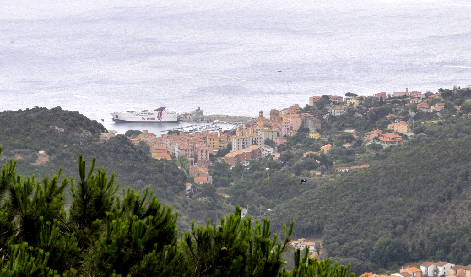 Rio Marina